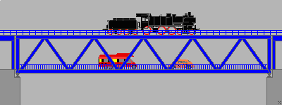 kombinierte Eisenbahn- und Straßenbrücke